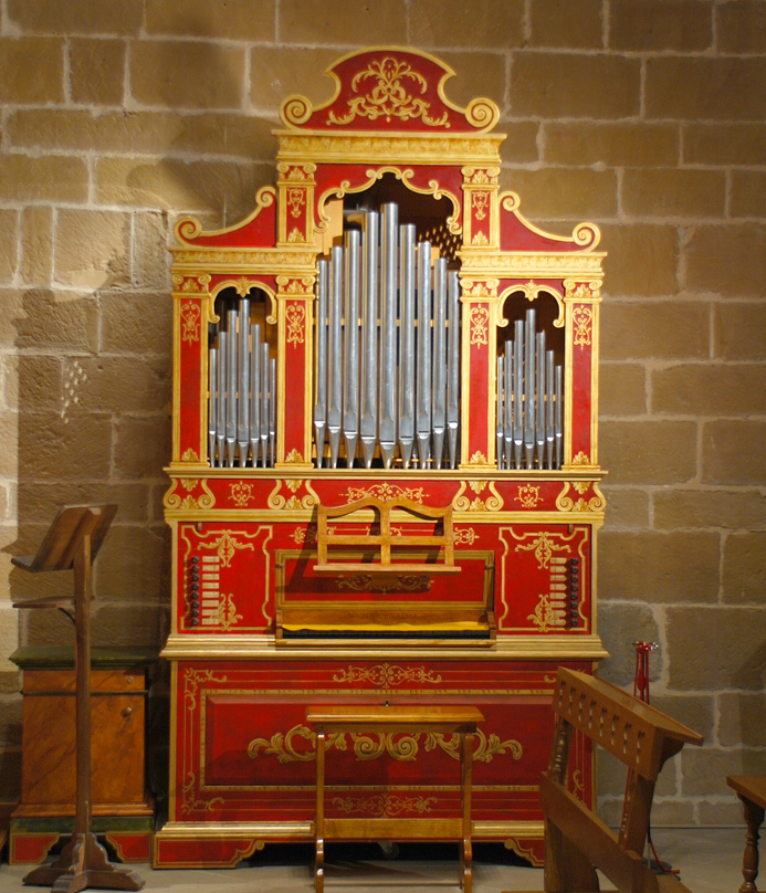 Órgano neobarroco de la catedral de Pamplona